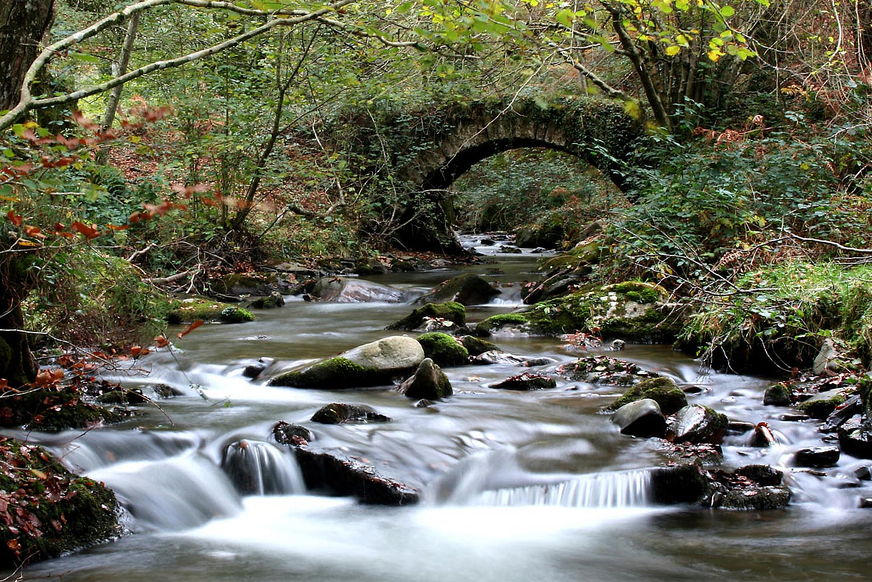 Aragonés: Agüerro en LeitzalarreaOtoño en Leitzalarrea